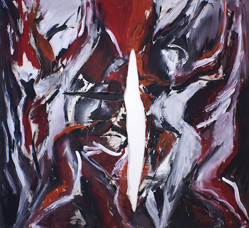 Malerei als Ereignis im Folkwang-Museum Essen von und mit Barbara Heinisch (Konzept und Malerei), Marie-Lu (Tanz) und Sybille Pomerin (Musik) - Maße 205 x 225 cm